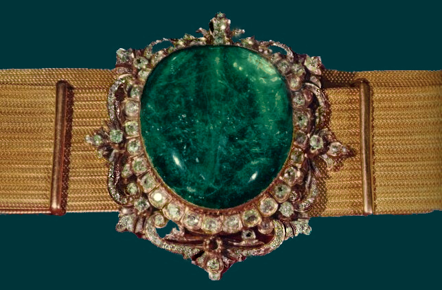 Ceinture Impériale